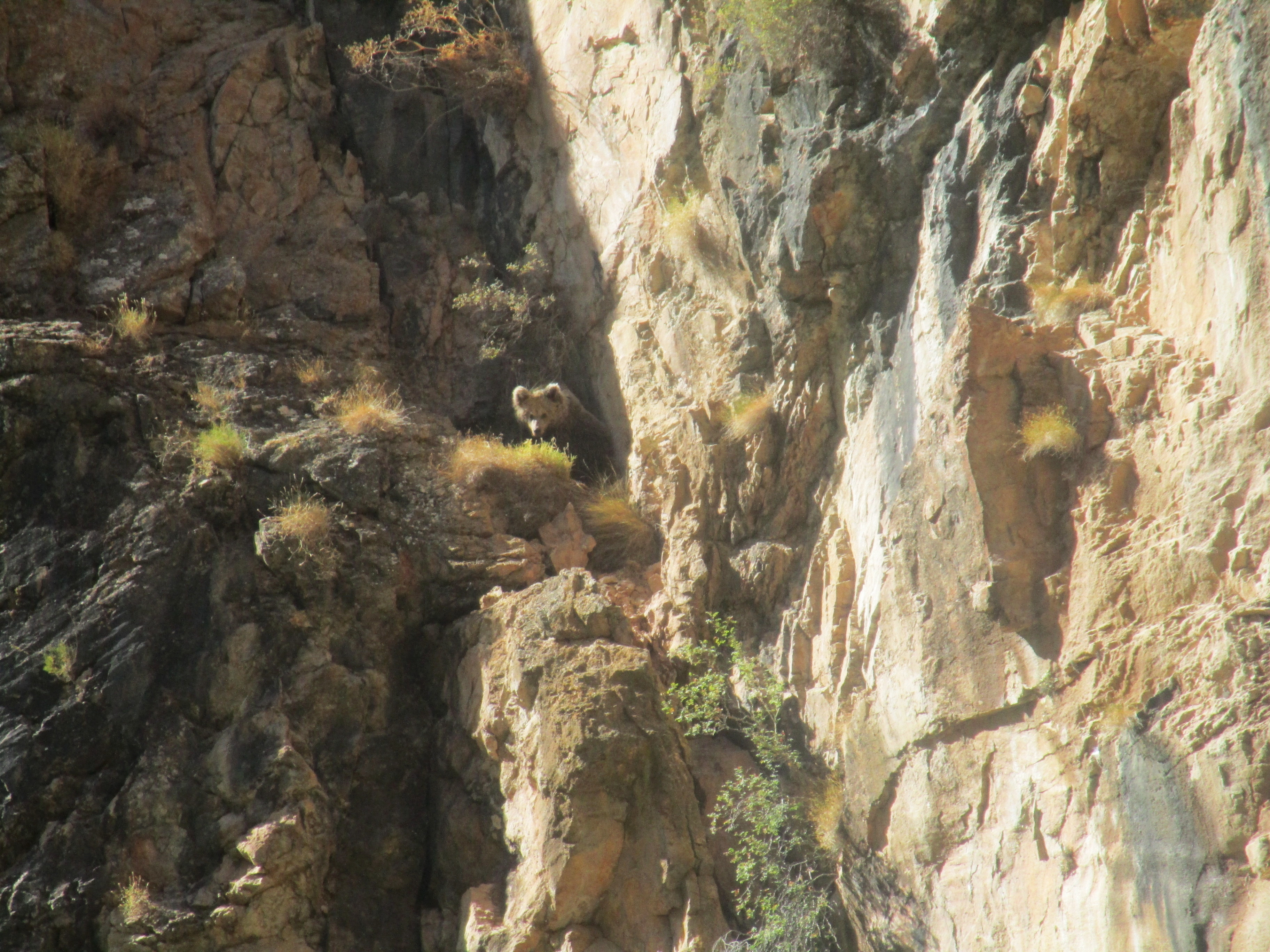 Тяньшаньский бурый медведь на скалах Чаткальского хребта, на границе Чаткальского заповедника. Бостанлыкский район, Ташкентская область, Республика Узбекистан